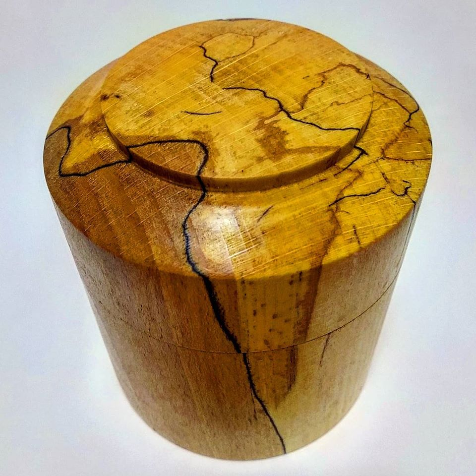 Round lidded box made from spalted beech